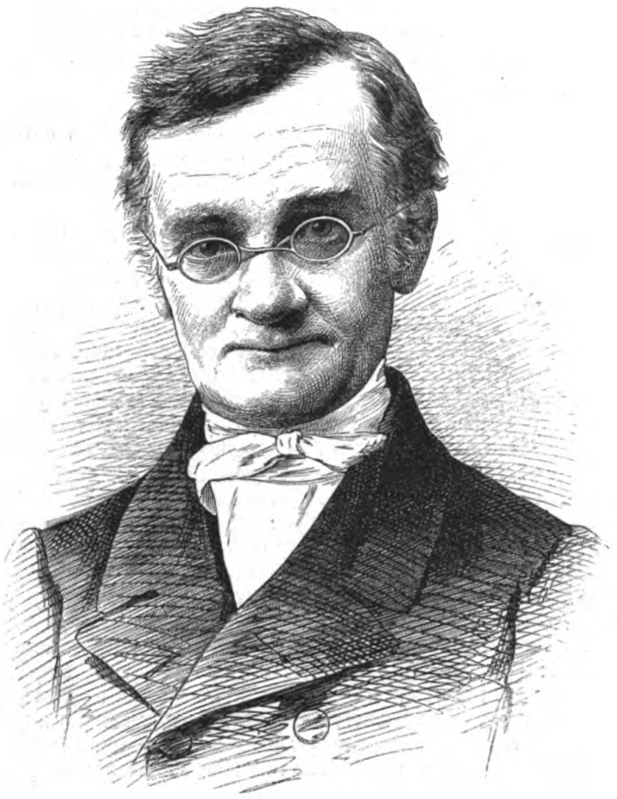 Richard Rothe, deutscher protestantischer Theologe, 1865.